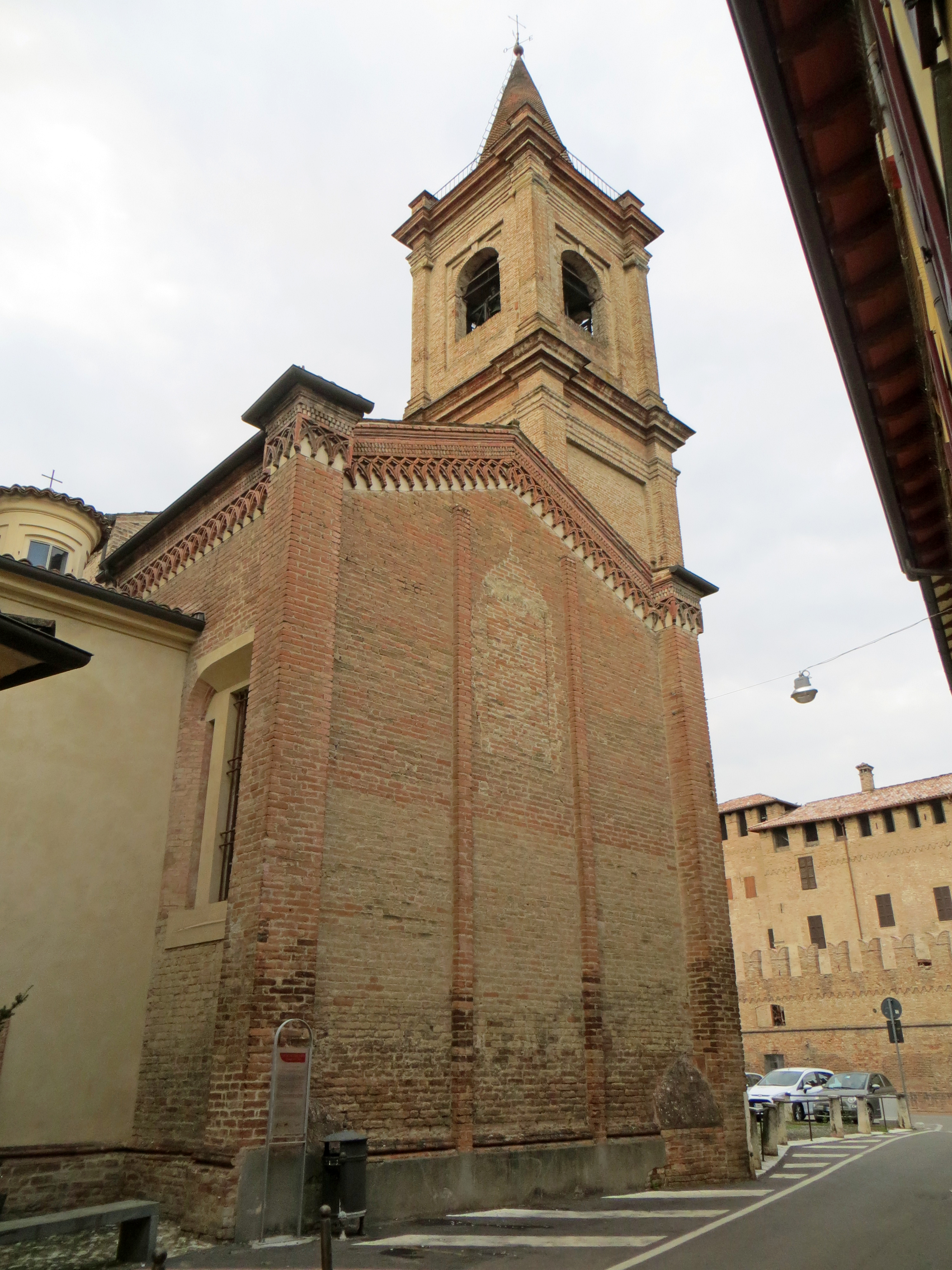 Chiesa di Santa Croce (Fontanellato) - retro